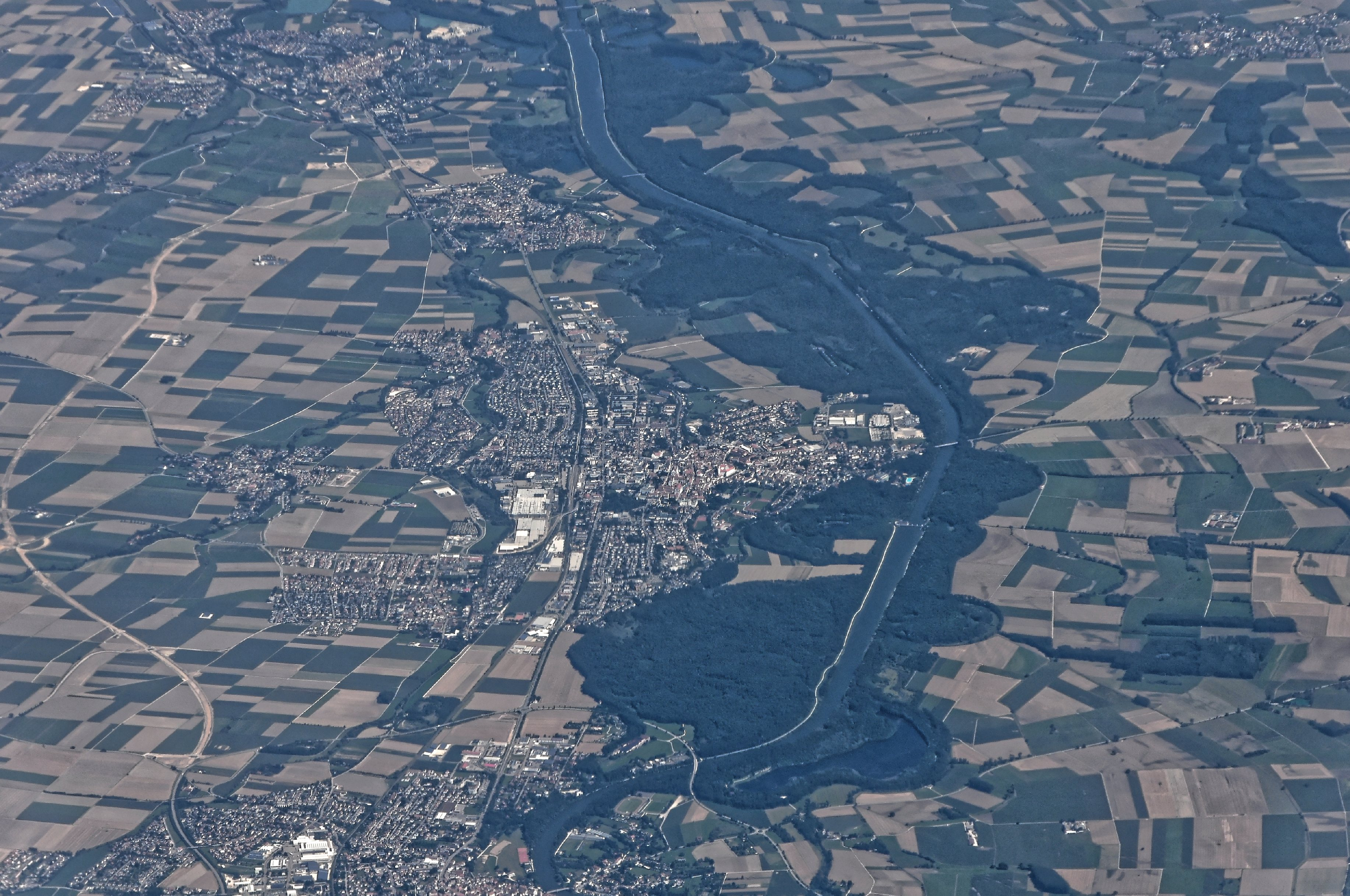 Bilder vom Flug -Rom-Düsseldorf-Hamburg 2013 Dieses Foto entstand in Zusammenarbeit mit Stadtbesichtigungen.de Die Seiten Stadtbesichtigungen.de, der dazugehörige Reise Blog sowie die Facebookseite: Stadtbesichtigungen Rom dürfen dieses Bild für Ihre Veröffentlichungen ohne den Hinweis auf Wikipedia, Commons bzw der Lizenz verwenden. Die Verantwortlichen habe von mir (Ra Boe) die Originaldaten zur freien Verfügung übermittelt bekommen.